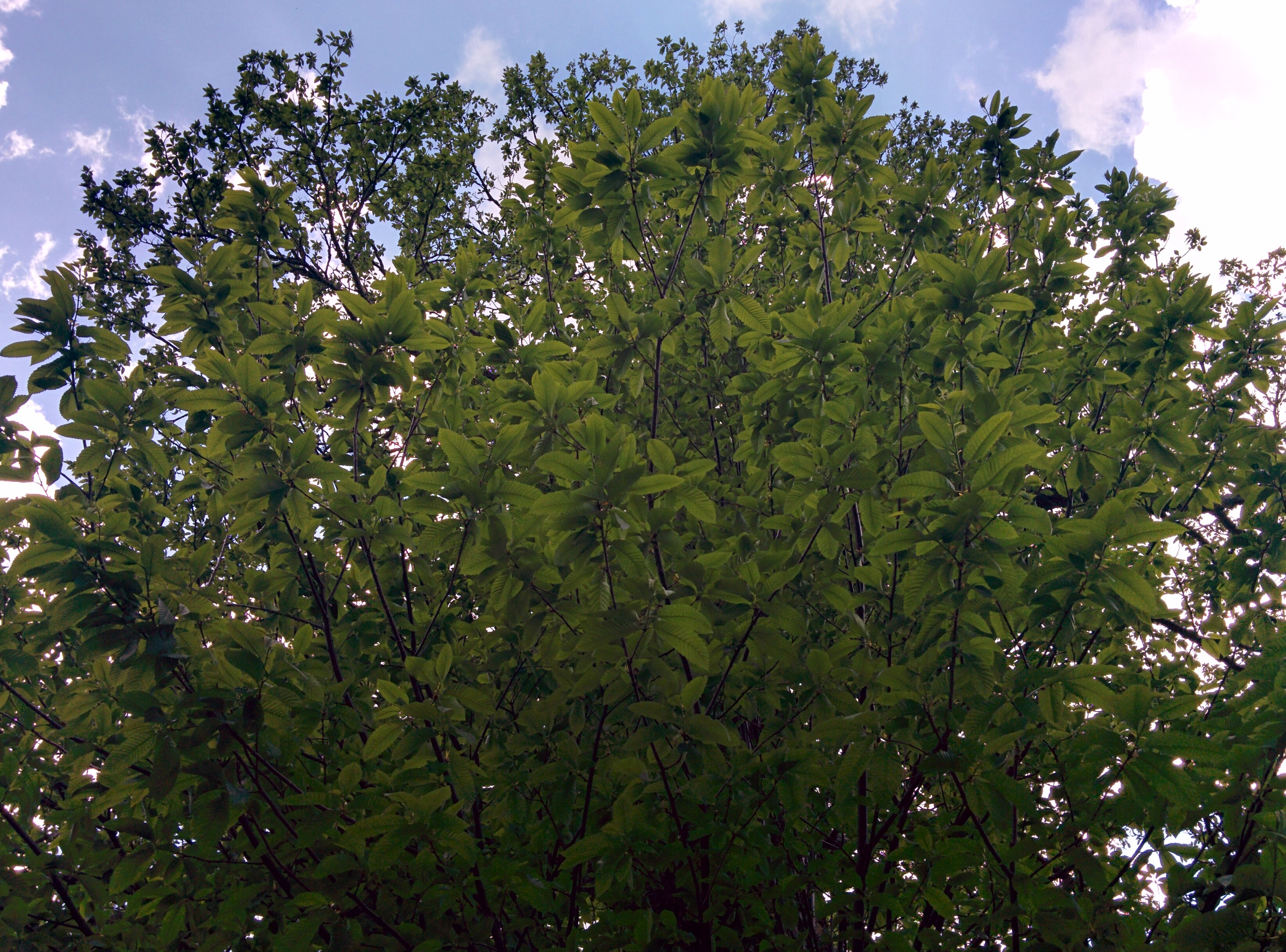 Ejemplar de Castanea sativa en los alrededores de Tejedo de Ancares (León, España).